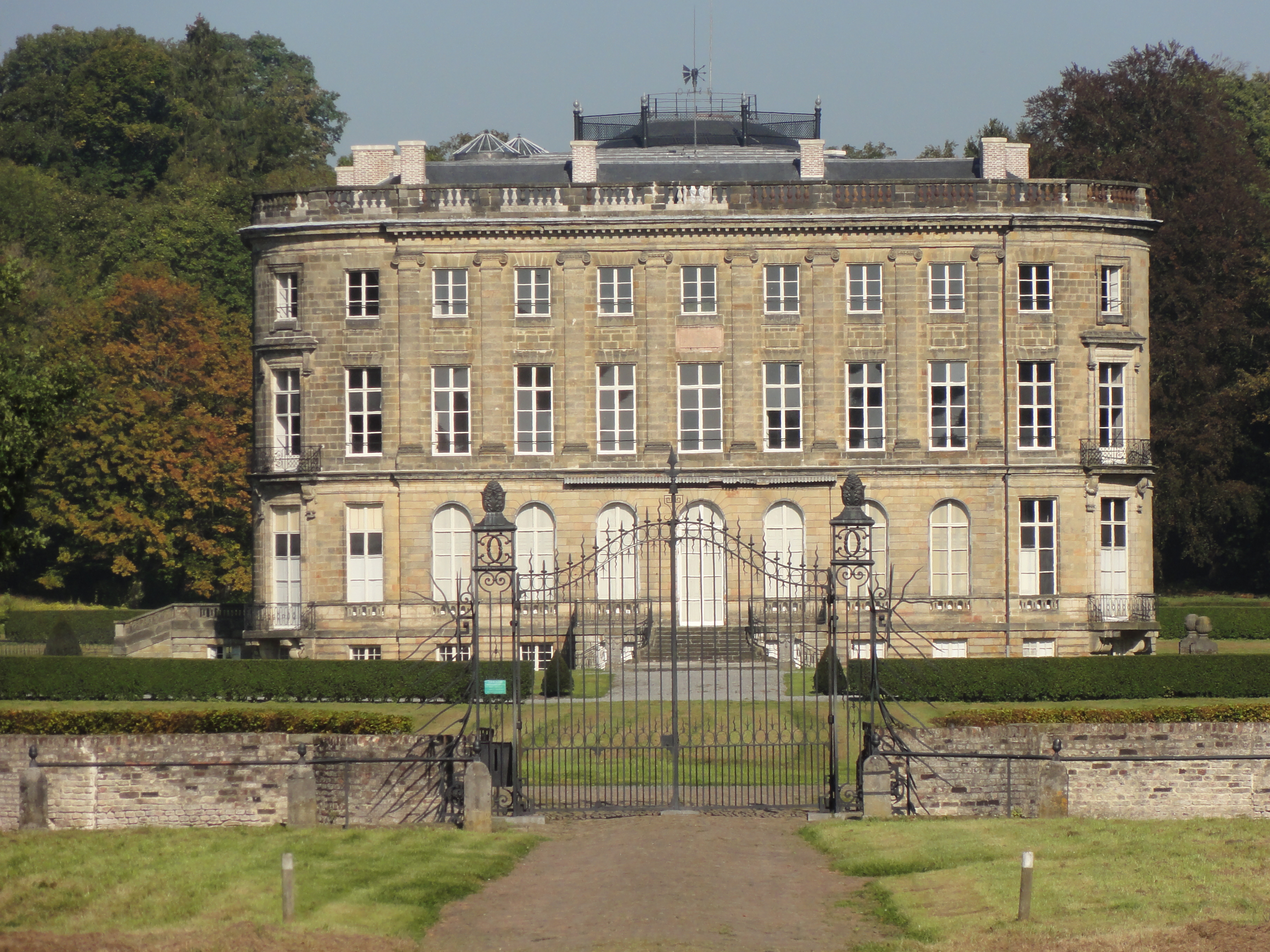 Château de l'Hermitage, lieu de la fondation de la Compagnie des mines d'Anzin, Condé-sur-l'Escaut, Nord, Nord-Pas-de-Calais, France. .